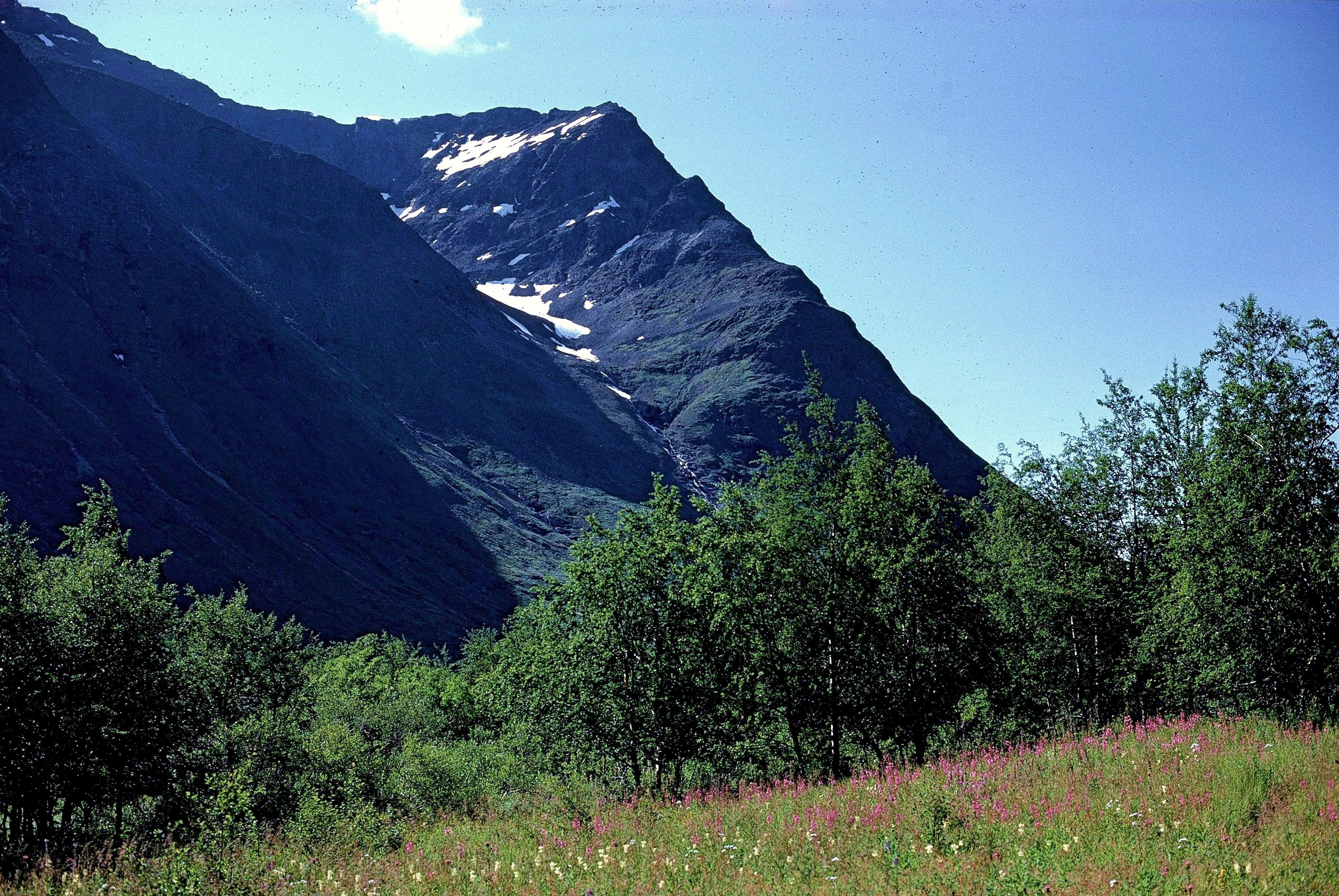 änsmark i Rapadalen, Sarek